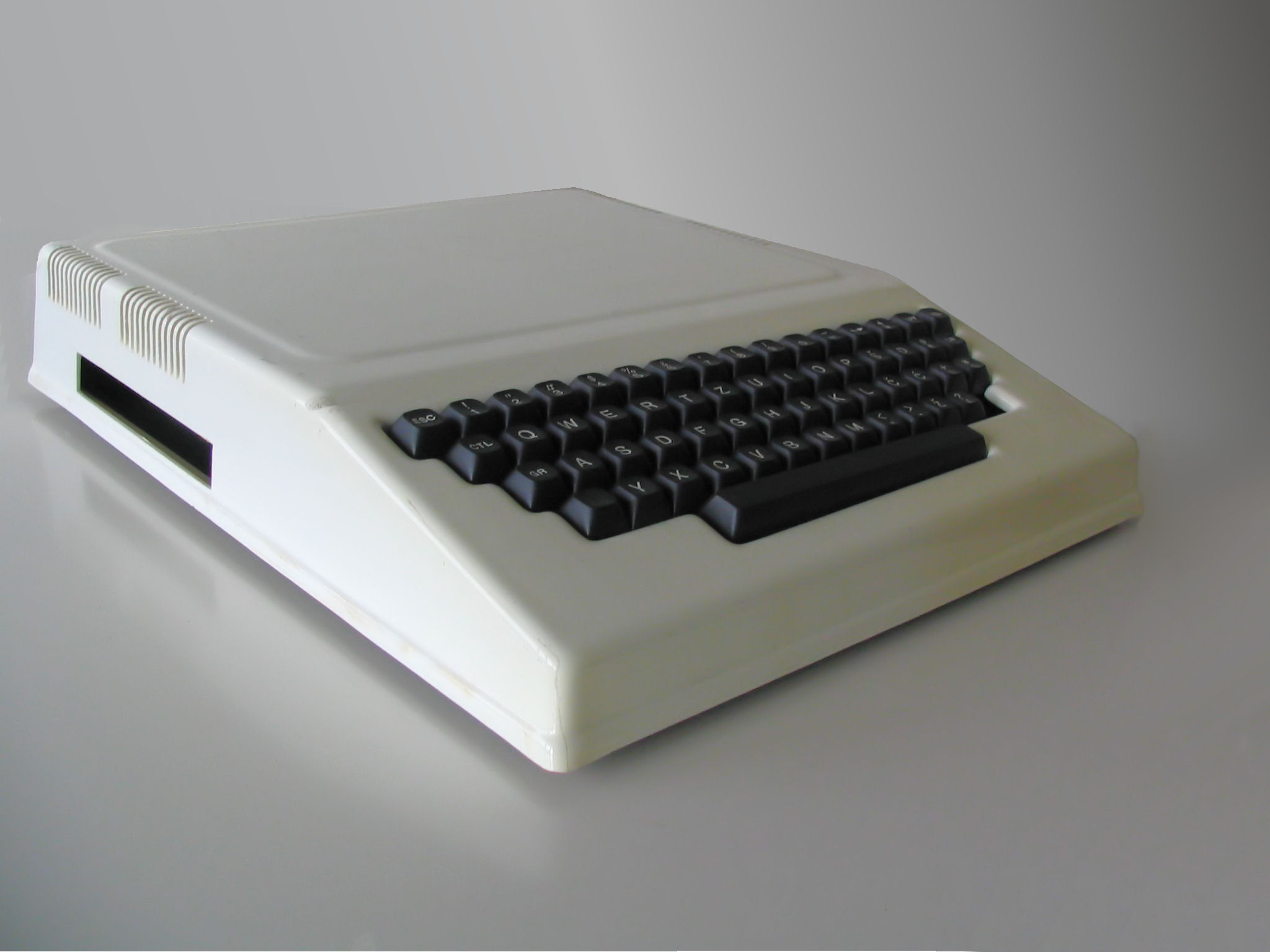 racunalo Galeb